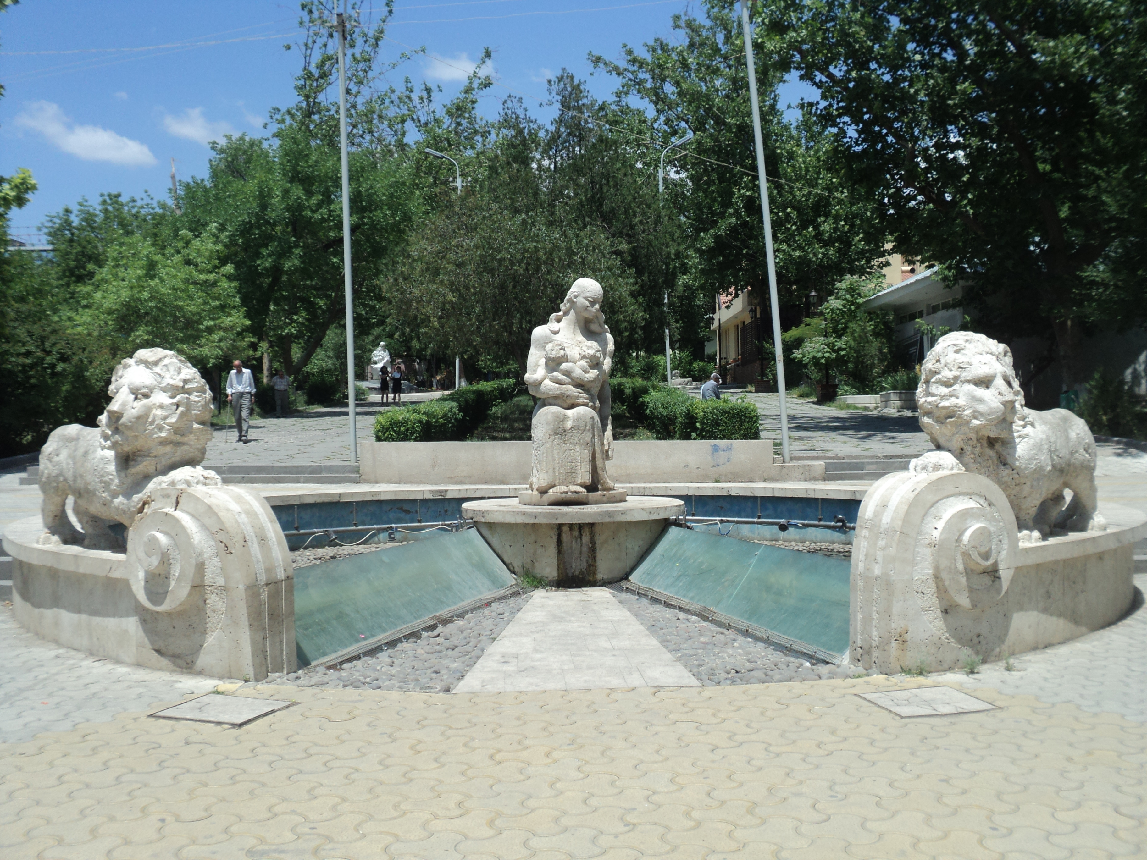 Ծովինար. Սանասարի եւ Բաղդասարի ծնունդը Քանդակագործ` Վիգեն Ավետիս Վահագն Դավթյանի անվան զբոսայգի, 2008 Գտնվում է Արաբկիր համայնքում, Կոմիտաս պողոտայի և Նաիրի Զարյան փողոցի միջև ընգած զբոսայգում, Արաբկիր թաղապետարանի մոտ 3/7